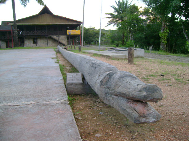 Banco de madera tallado con la forma de un caimán, ubicado en la parte trasera de la Casa Arana